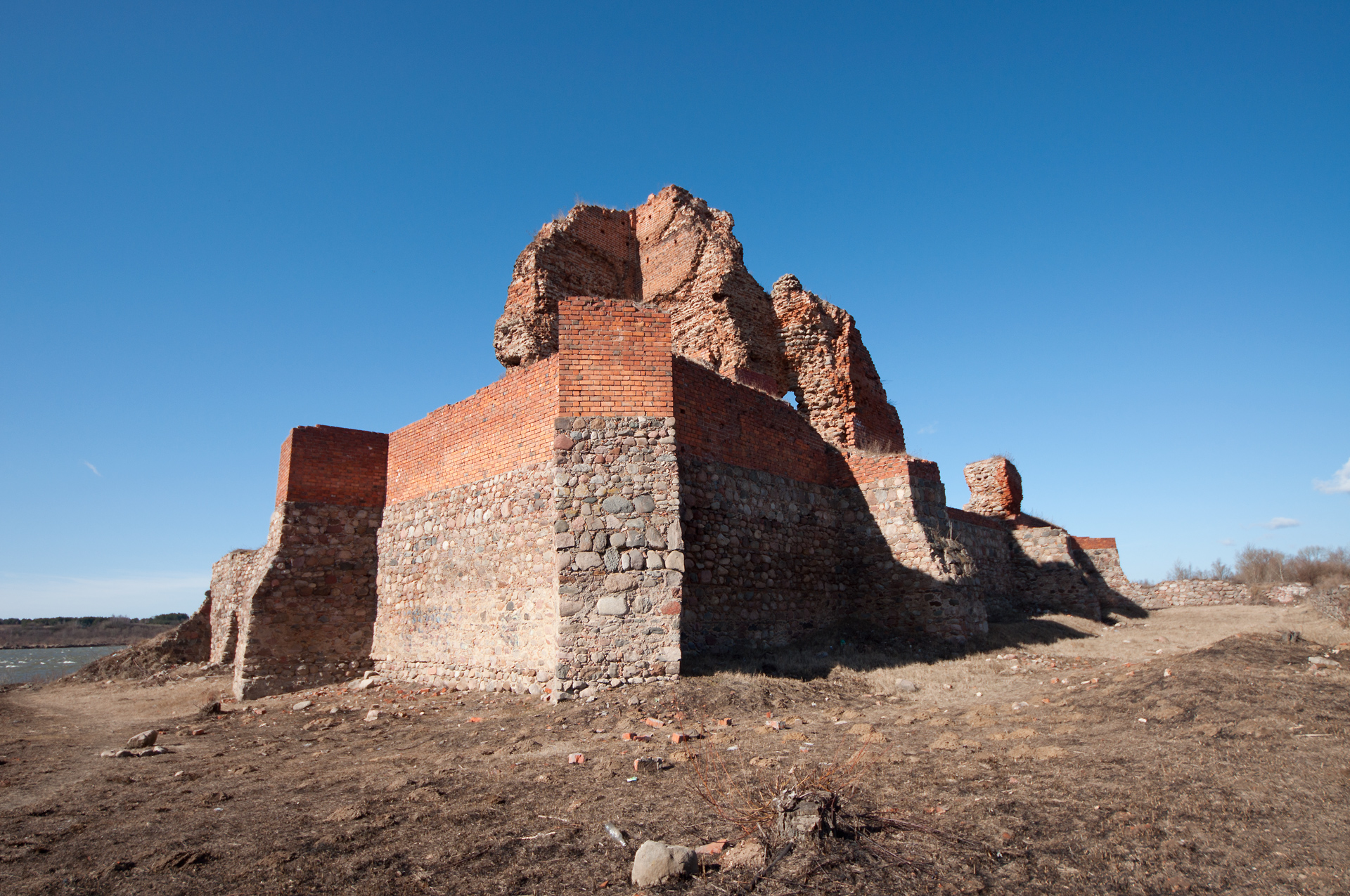 Bobrowniki - ruiny zamku, ok. 1398, poł. XVII